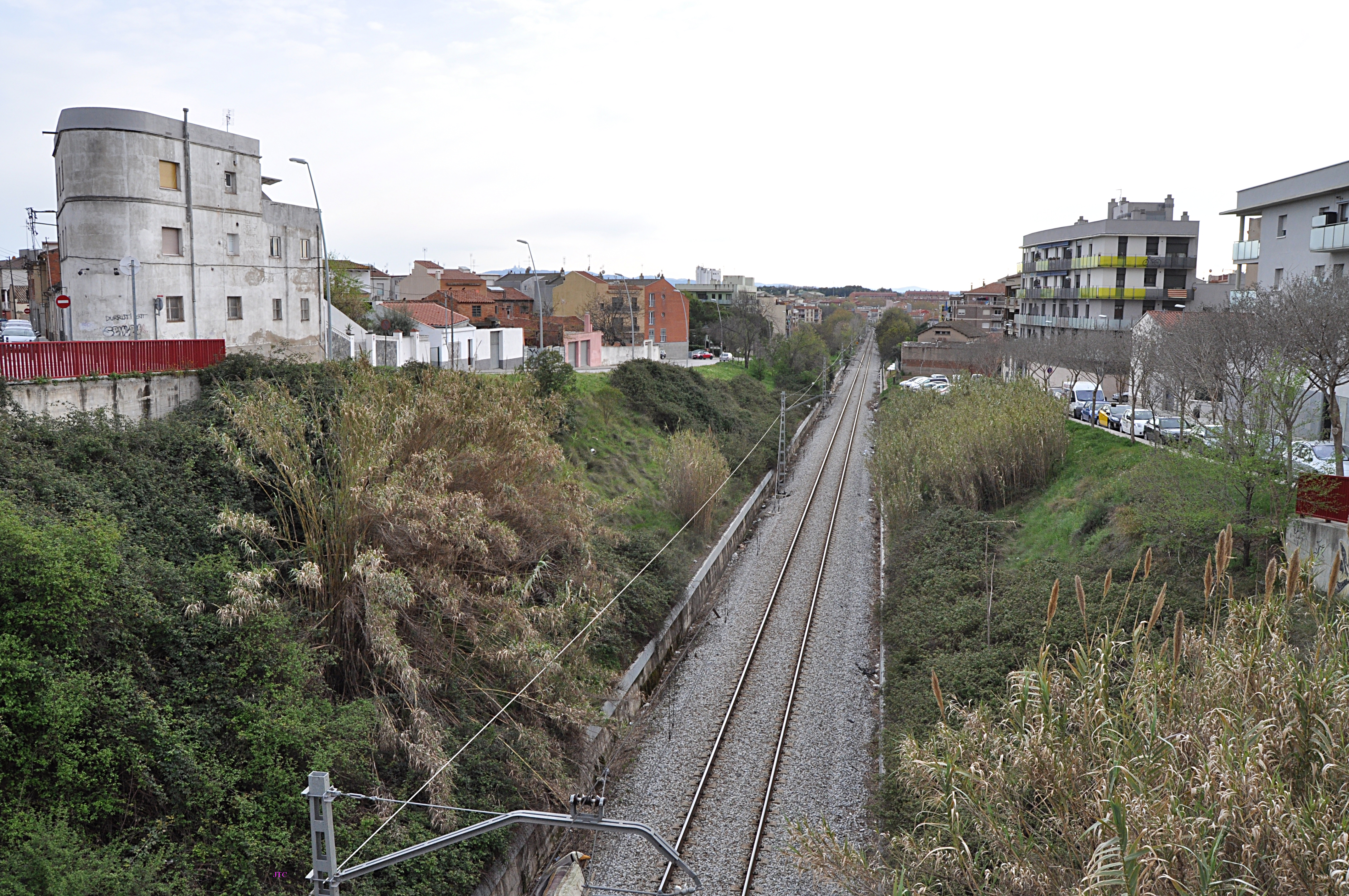 Línea de Puigcerdà en Mollet del Vallès, mirando hacia Mollet-Santa Rosa y Barcelona.